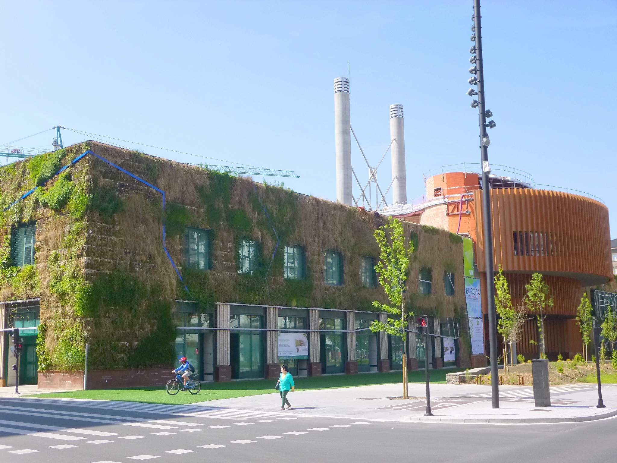 Palacio de Congresos y Exposiciones Europa (Vitoria)